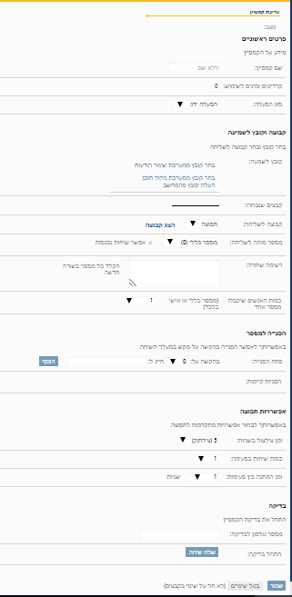 צילום מסך מתוך תכנה השולחת צינתוקים